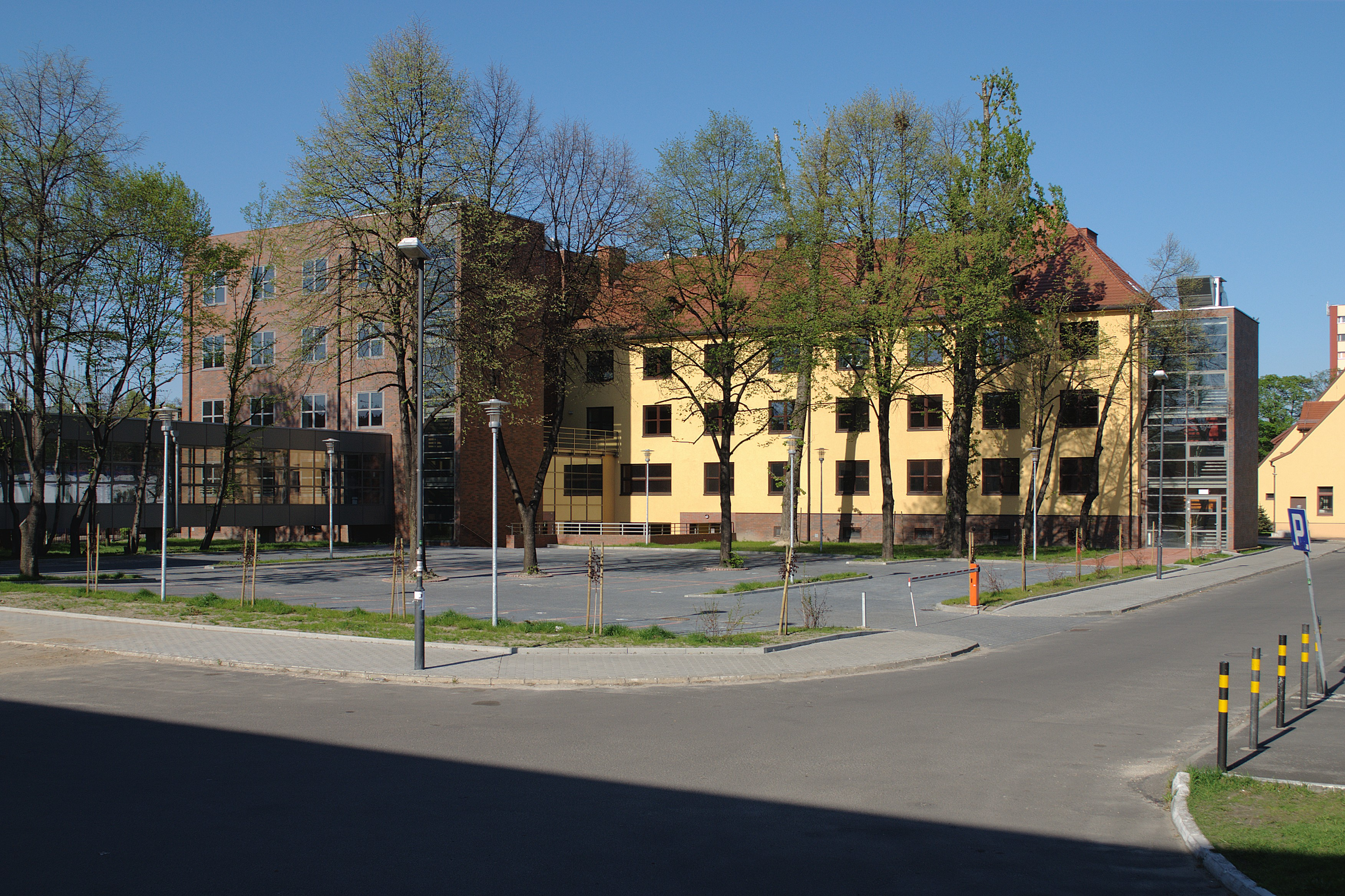 Zabrze. Ulica Roosevelta. Budynki Politechniki.